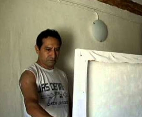 Pintor Elvis Garcia Moran pintando en su taller.